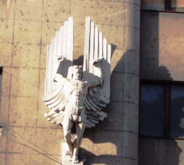 Фотографија зграде: Драгиша Брашован: Зграда Команде ваздухопловства у Земуну-Кип икара на десном крилу зграде, Аутор: Nicolo